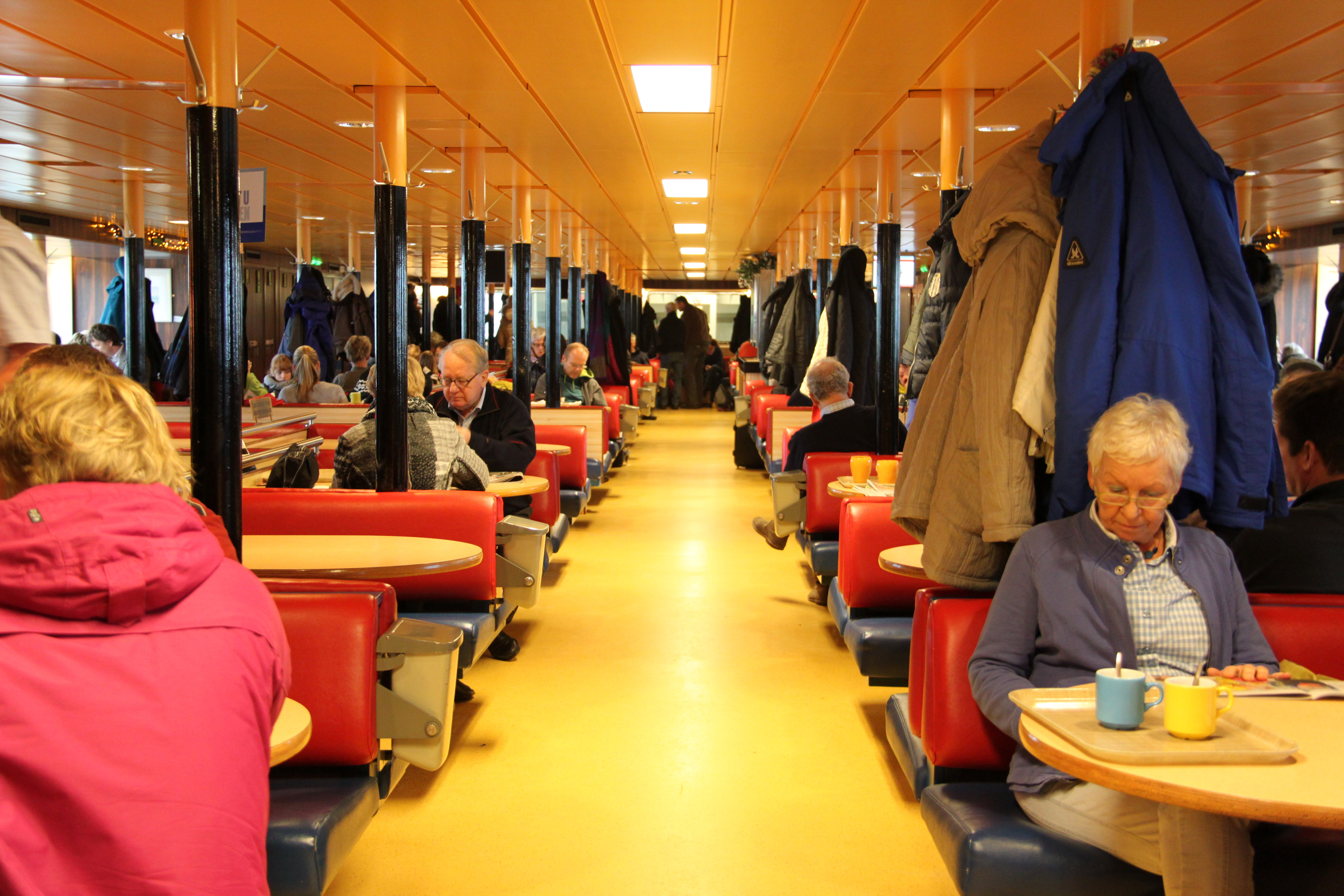 Interieur van de Monnik, een boot van de Wagenborg die tussen Lauwersoog en Schiermonnikoog vaart.